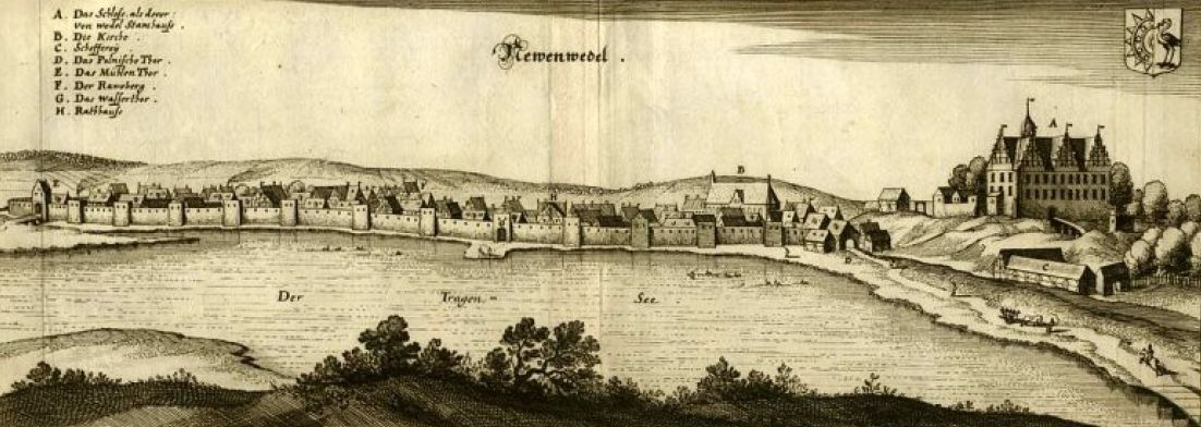 Panorama Drawna; autor: Matthäus Merian